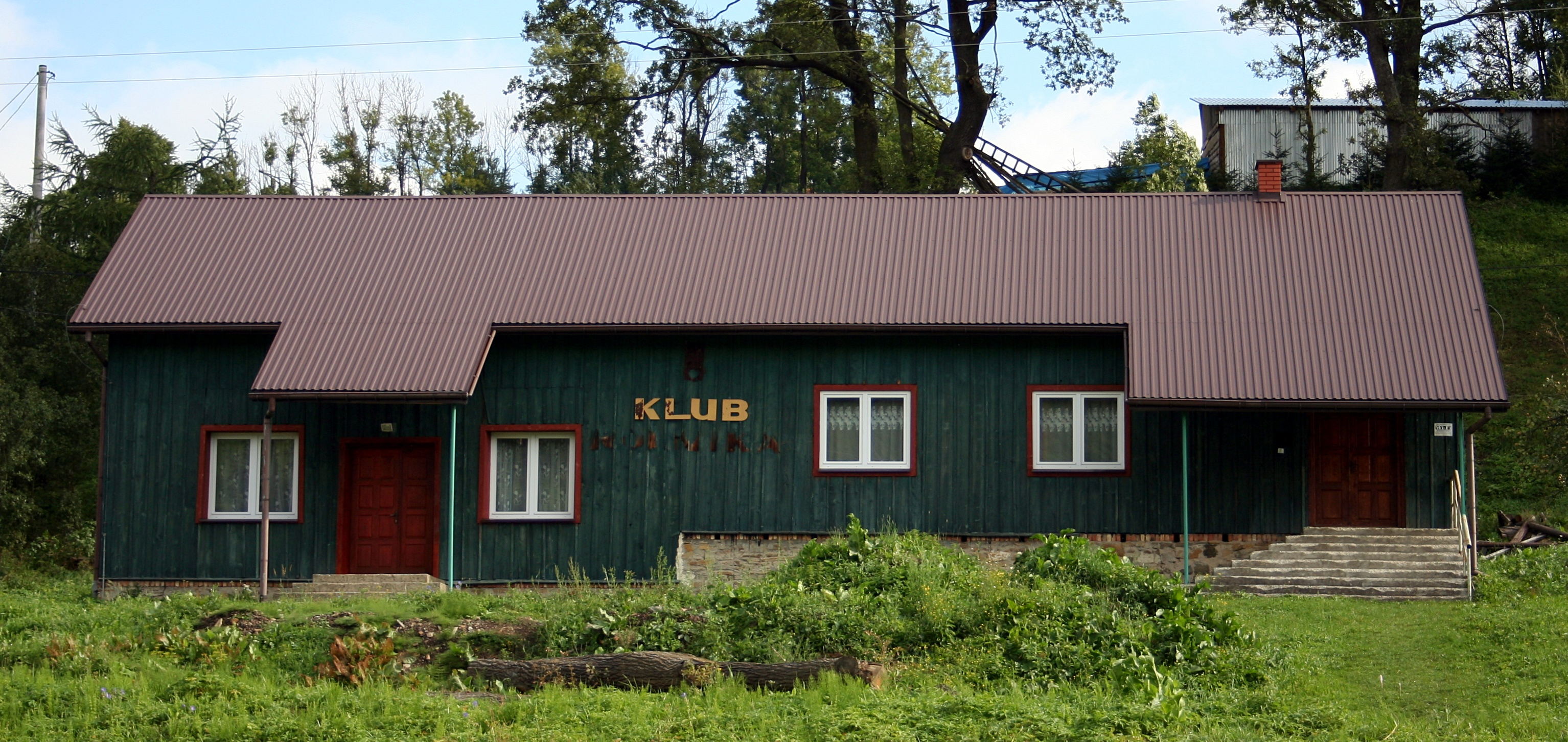 Klub rolnika w Komańczy, woj. podkarpackie